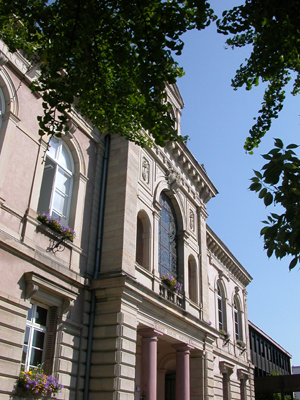 Mairie d'Illkirch, hôtel de ville Auteur: Quedza Date: 23.6.2006 (cliché et redimension)